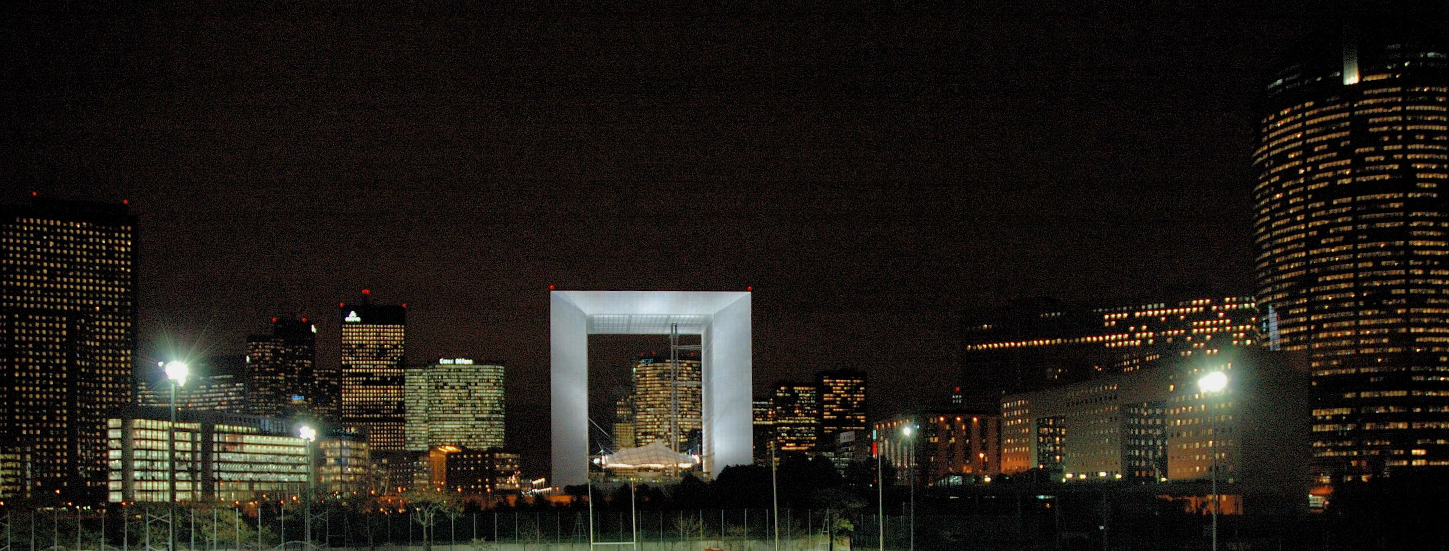 Grande_arche.jpg paris